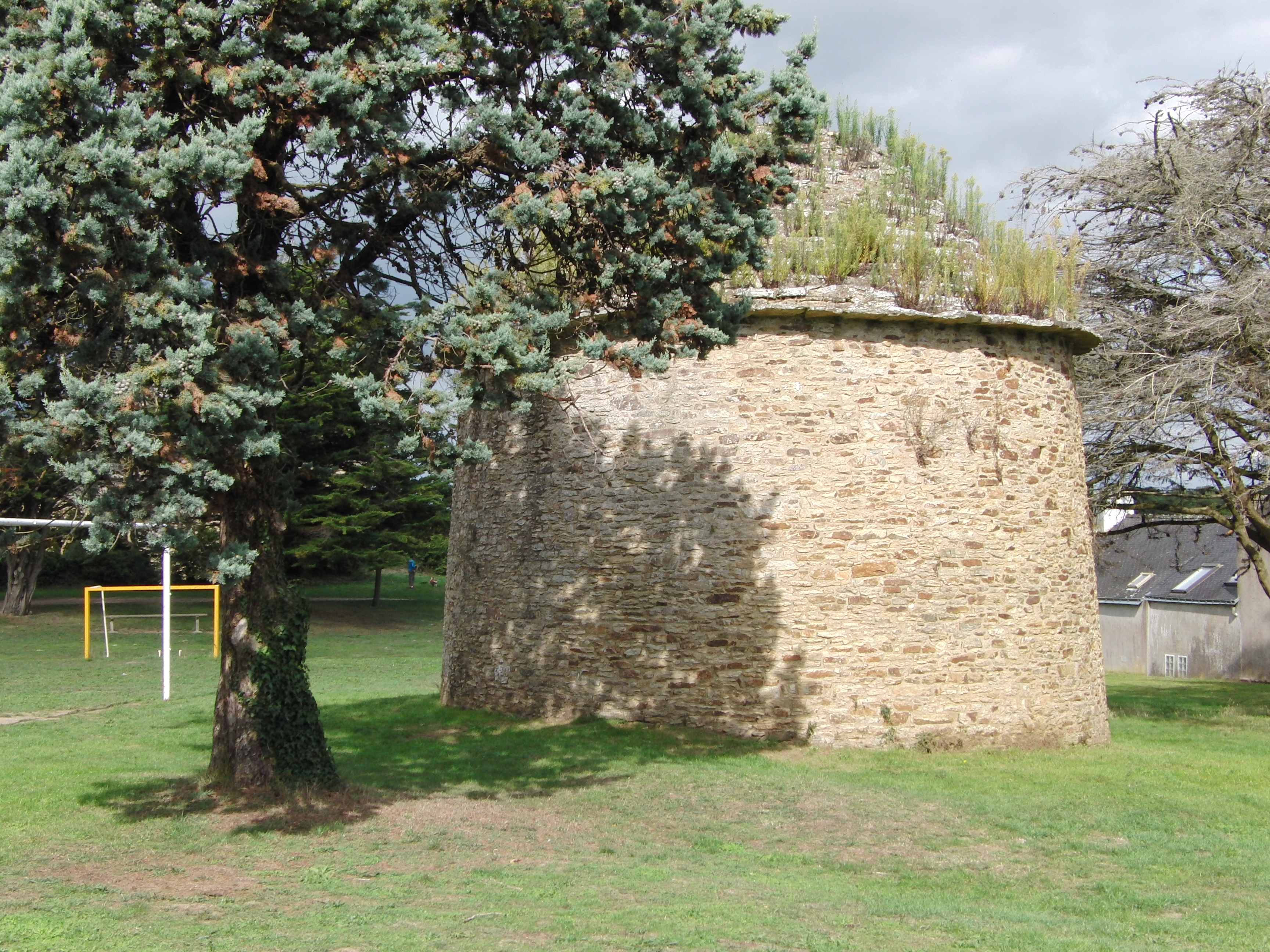 Description=